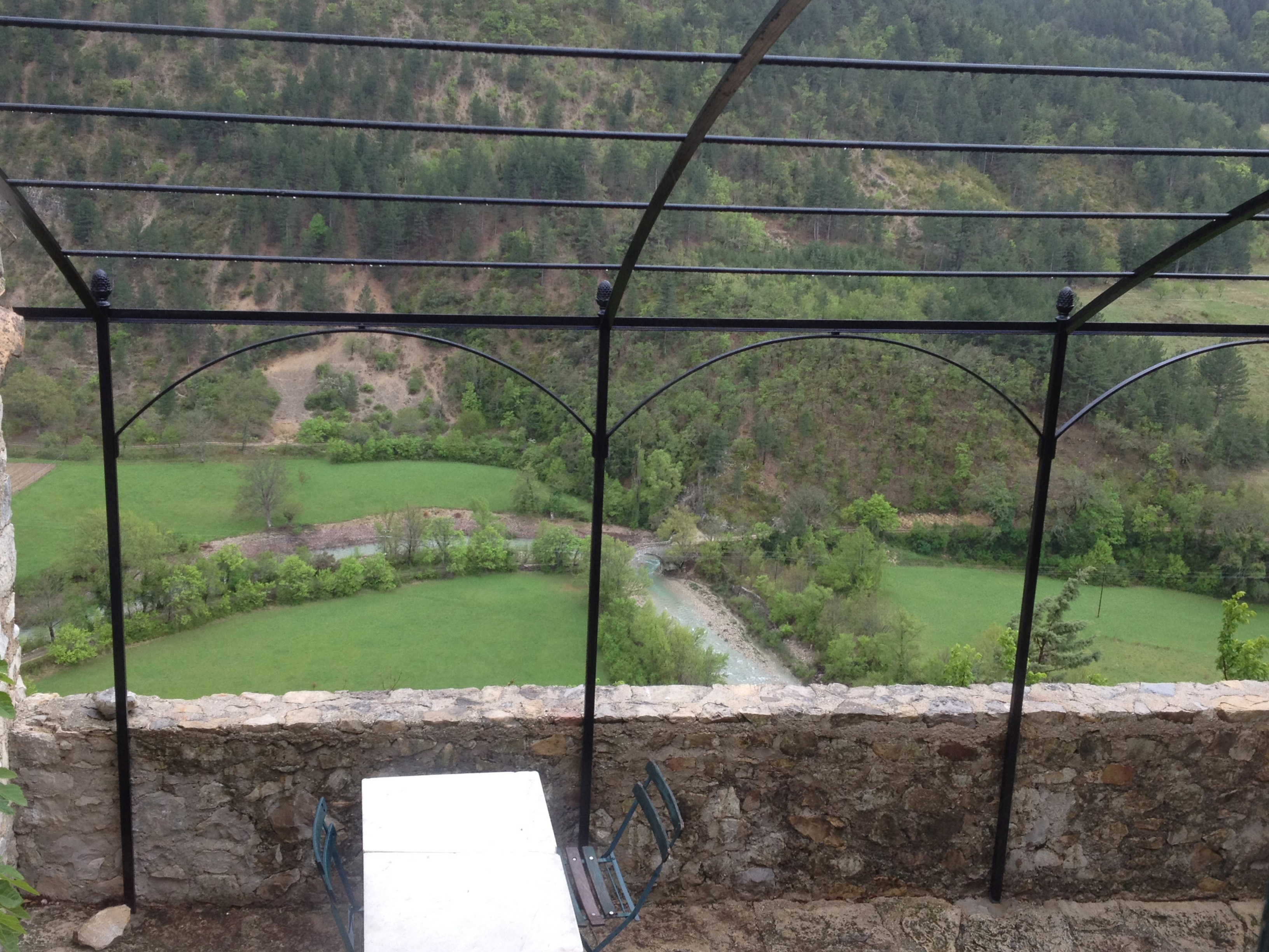 Brantes vue sur le Toulourenc et le pont romain (sic) du XIIIe siècle